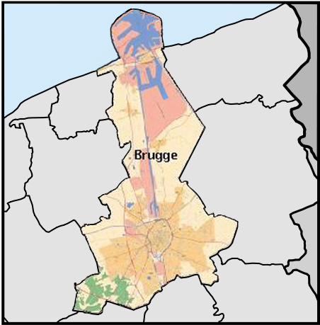 Brugge en haven